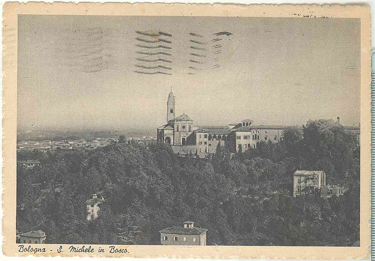 BO Bologna Santuario di San Michele in Bosco, già espropriato in epoca napoleonica fu acquistato dal professore Francesco Rizzoli nel 1879 per £55.000 dal Demanio dello Stato.